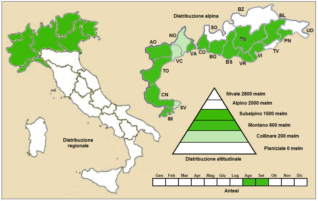 Aconitum anthora - Distribuzione